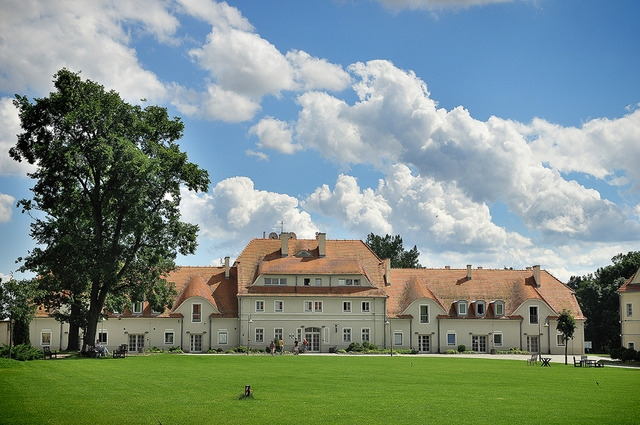 Pałac w Krzyżowej